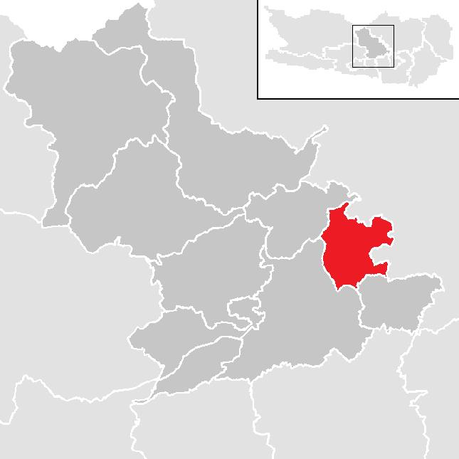 Bezirk Feldkirchen